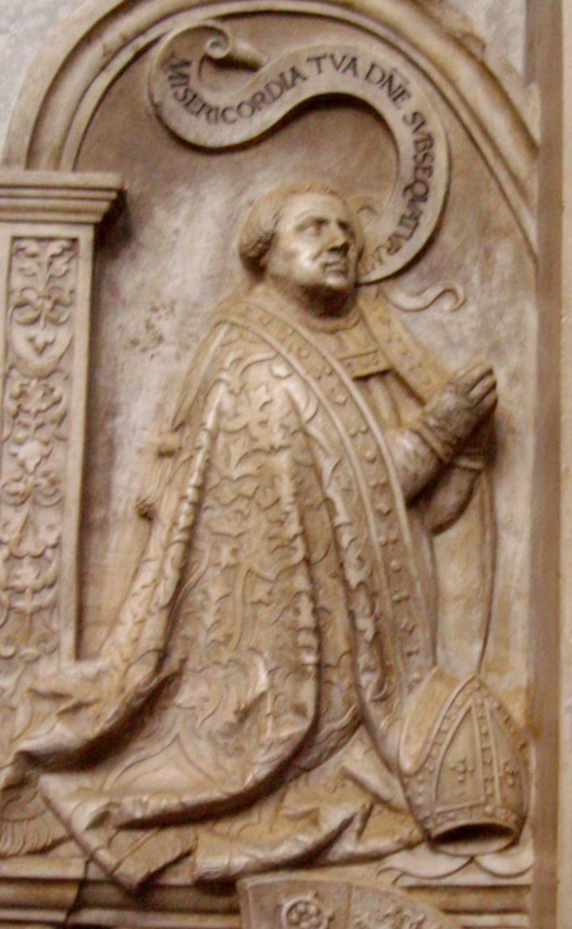 Albrecht_von_Hohenrechberg,_Bischof_von_Eichstätt_1429-1445,_auf_Epitaph_von_1552_im_Eichstätter_Dom